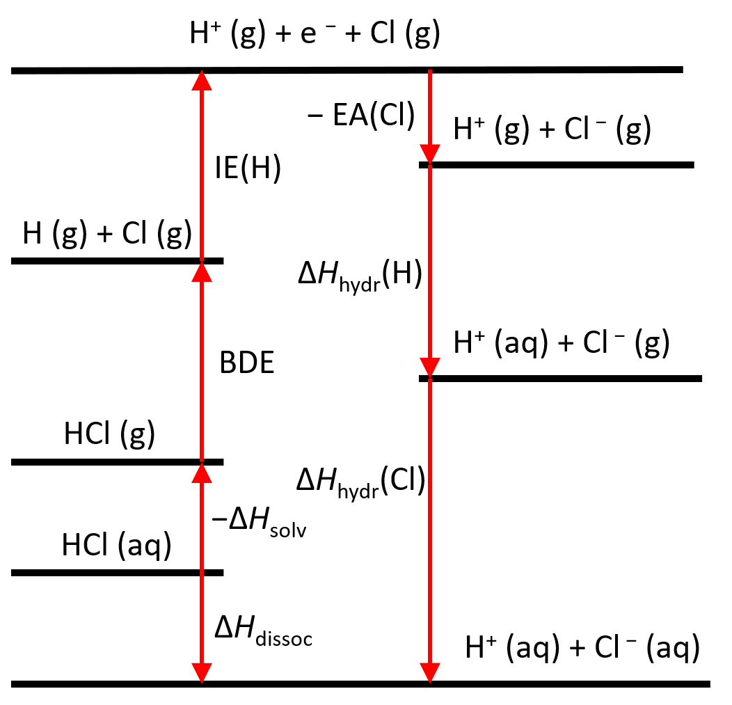 Born-Haber Cycle for HCl